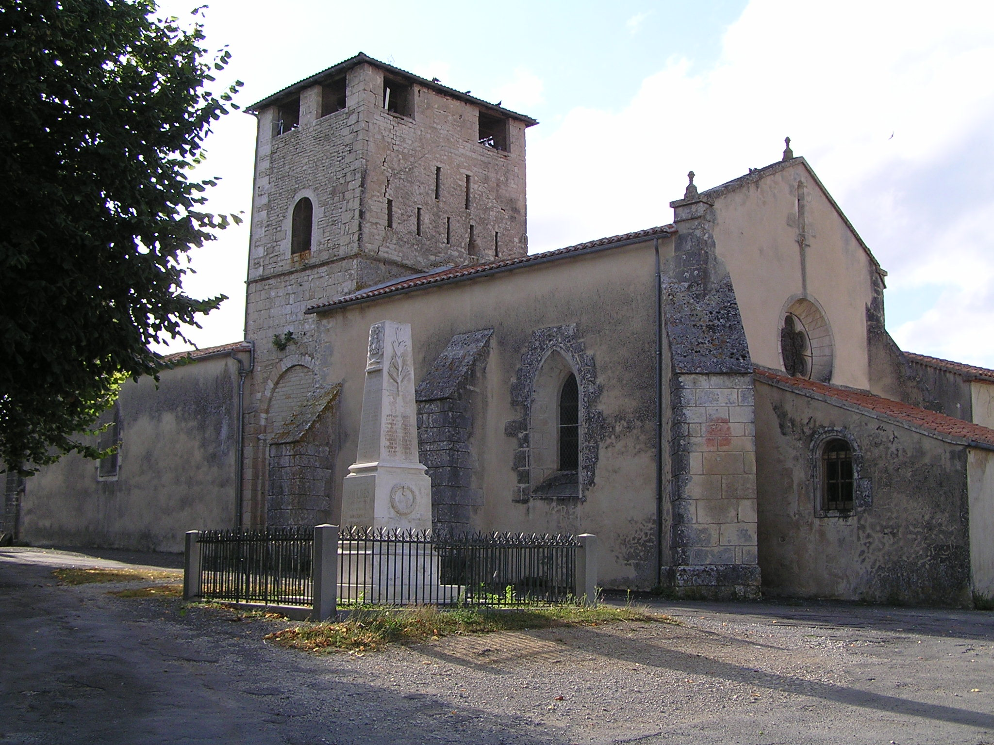 église et monument aux morts de Jauldes, Charente, France